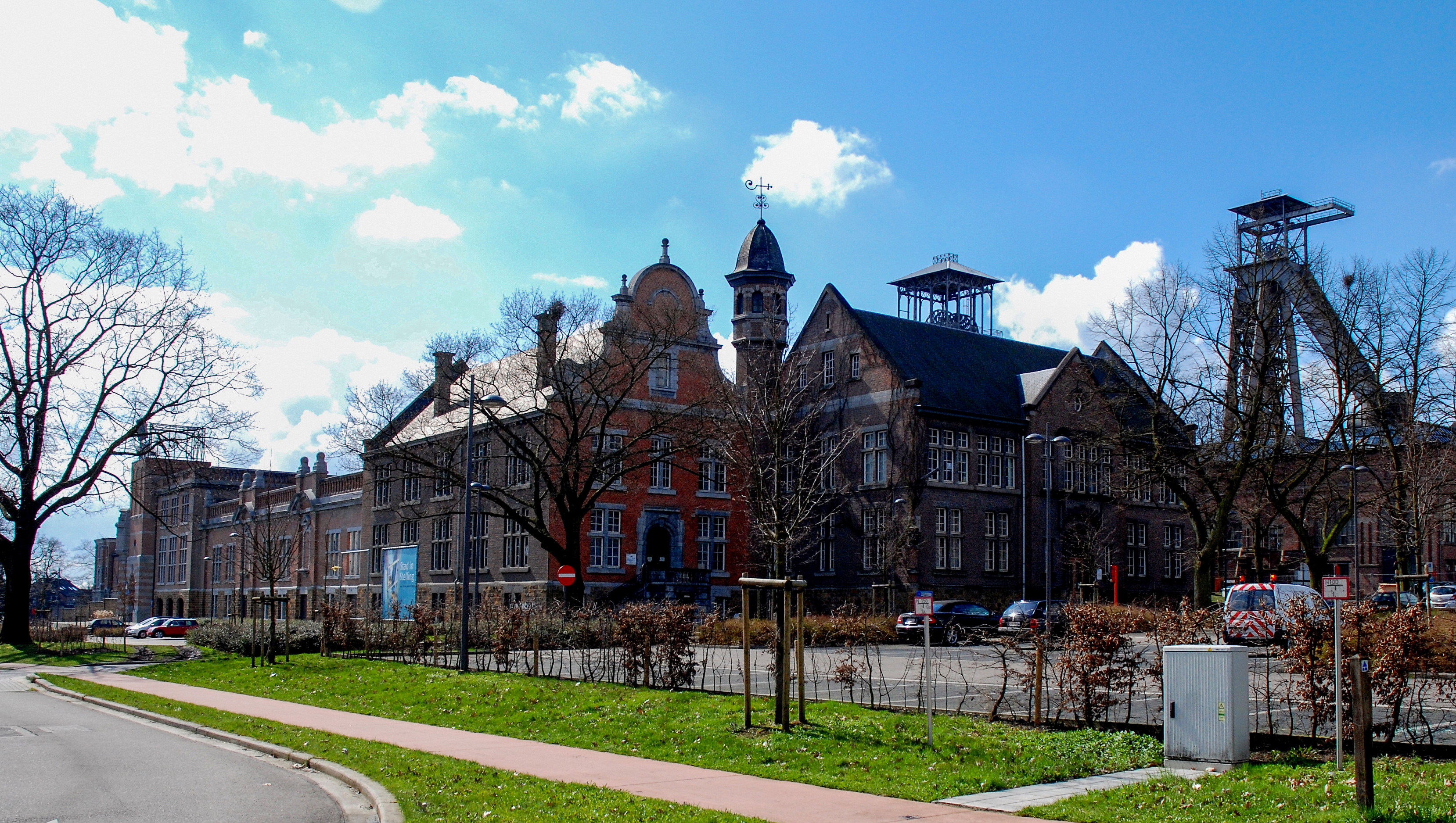 De steenkoolmijn van Winterslag, Genk, België